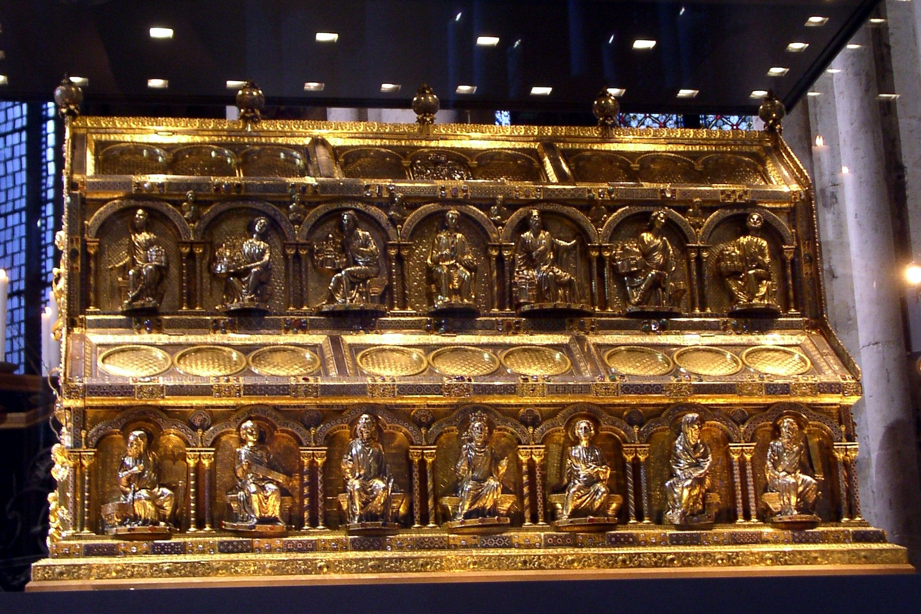 Kolonia - Relikwiarz Trzech Króli